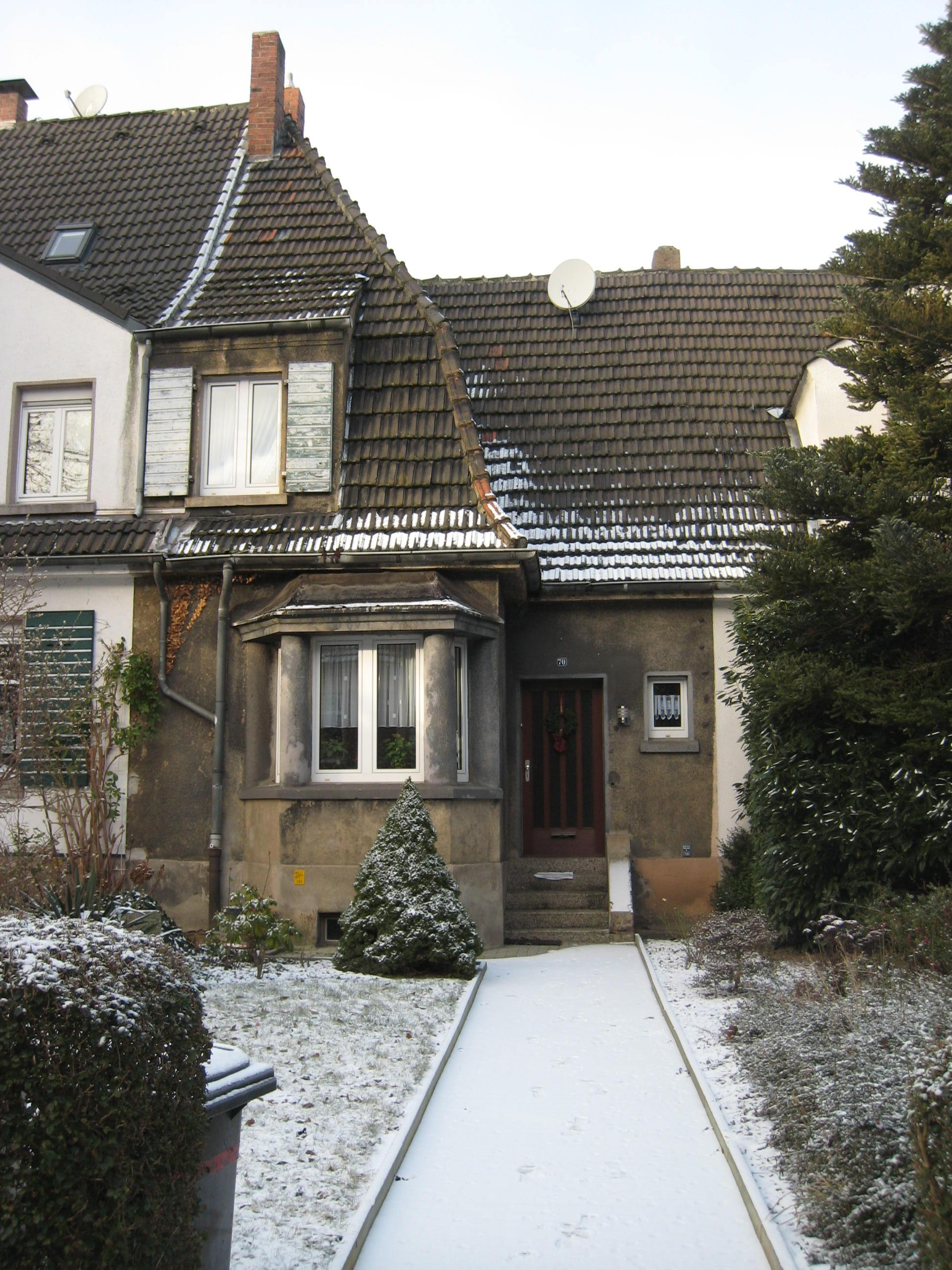 Siedlung Oberdorstfeld, Zechenstraße 70